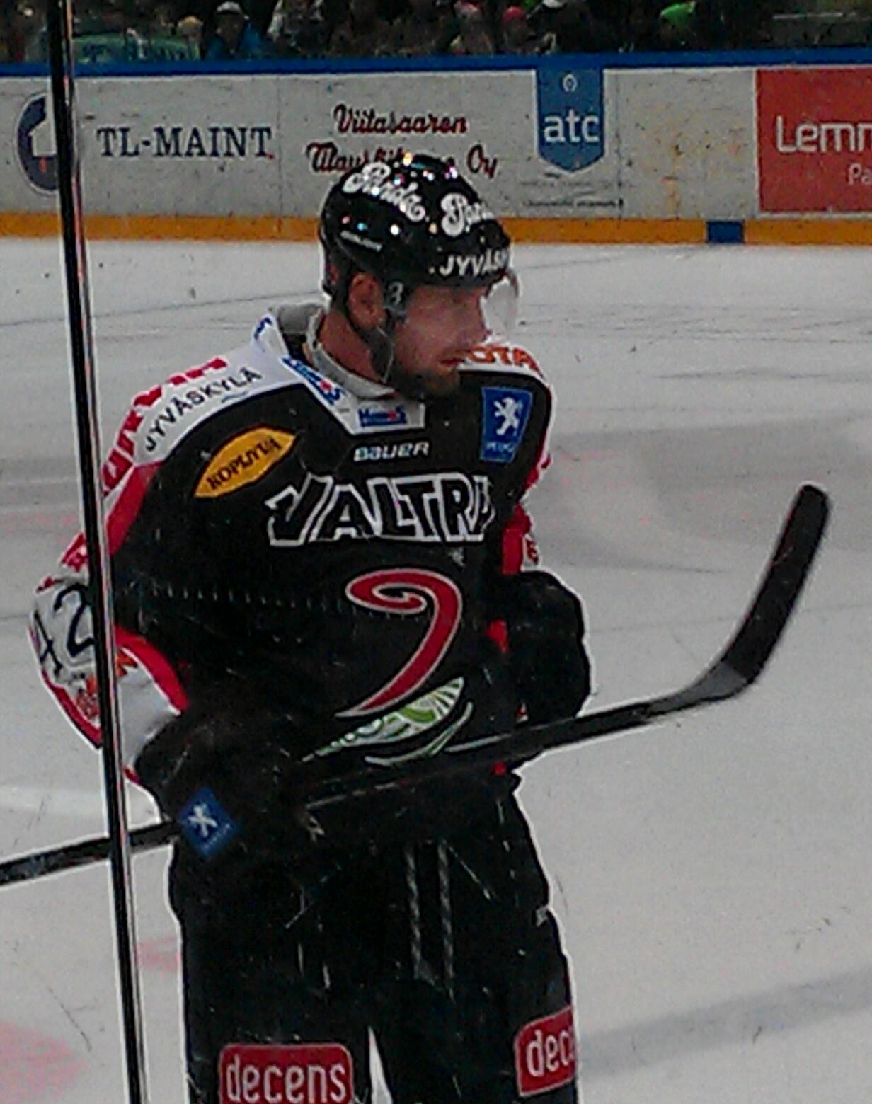 Pavel Skrbek JYPin paidassa.